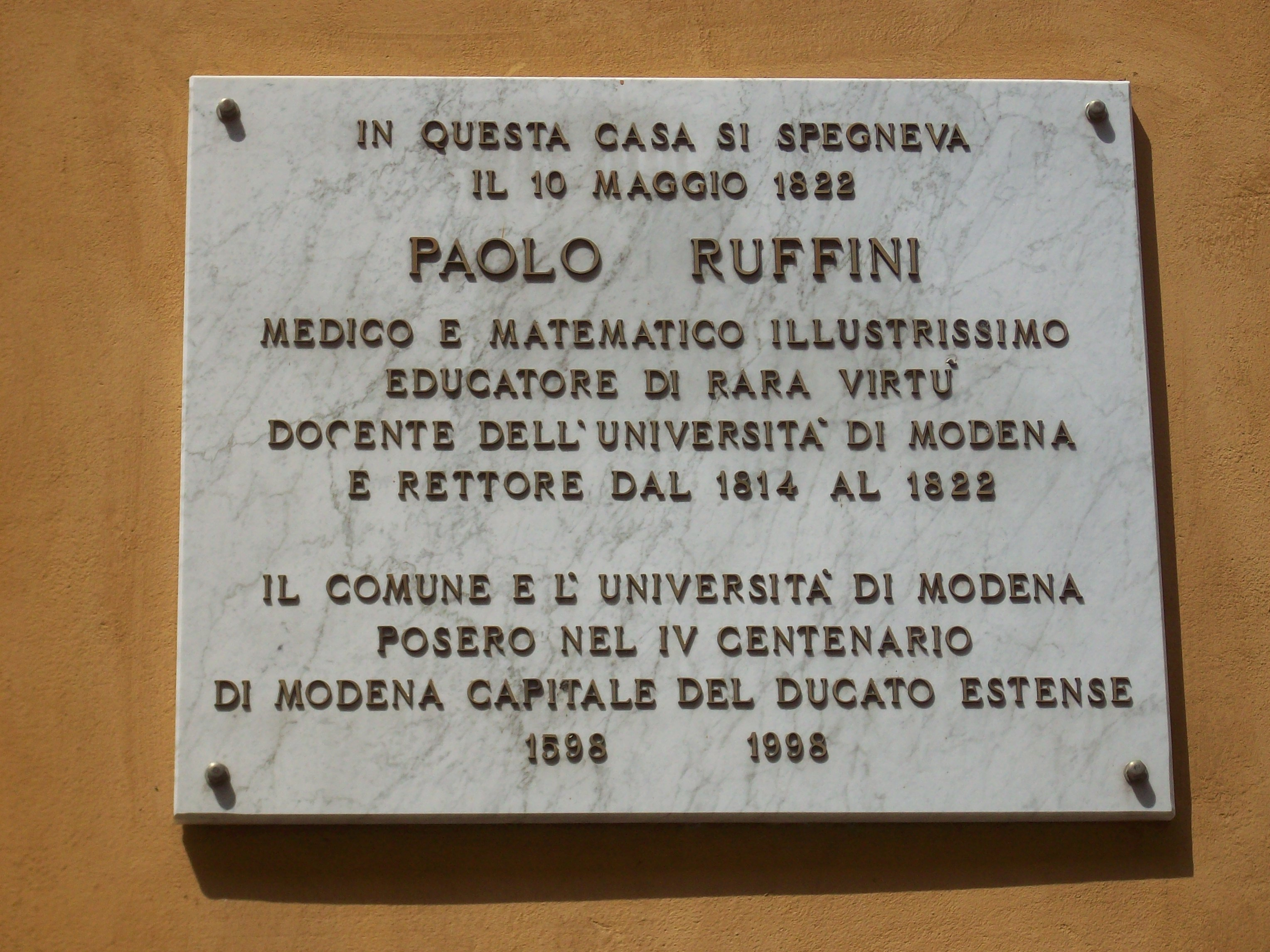 Targa alla memoria di Paolo Ruffini: "In questa casa si spegneva il 10 maggio 1822 Paolo Ruffini medico e matematico illustrissimo educatore di rara virtù docente dell'Università di Modena e rettore dal 1814 al 1822 il Comune e l'Università di Modena posero nel IV centenario di Modena capitale estense 1598 1998".